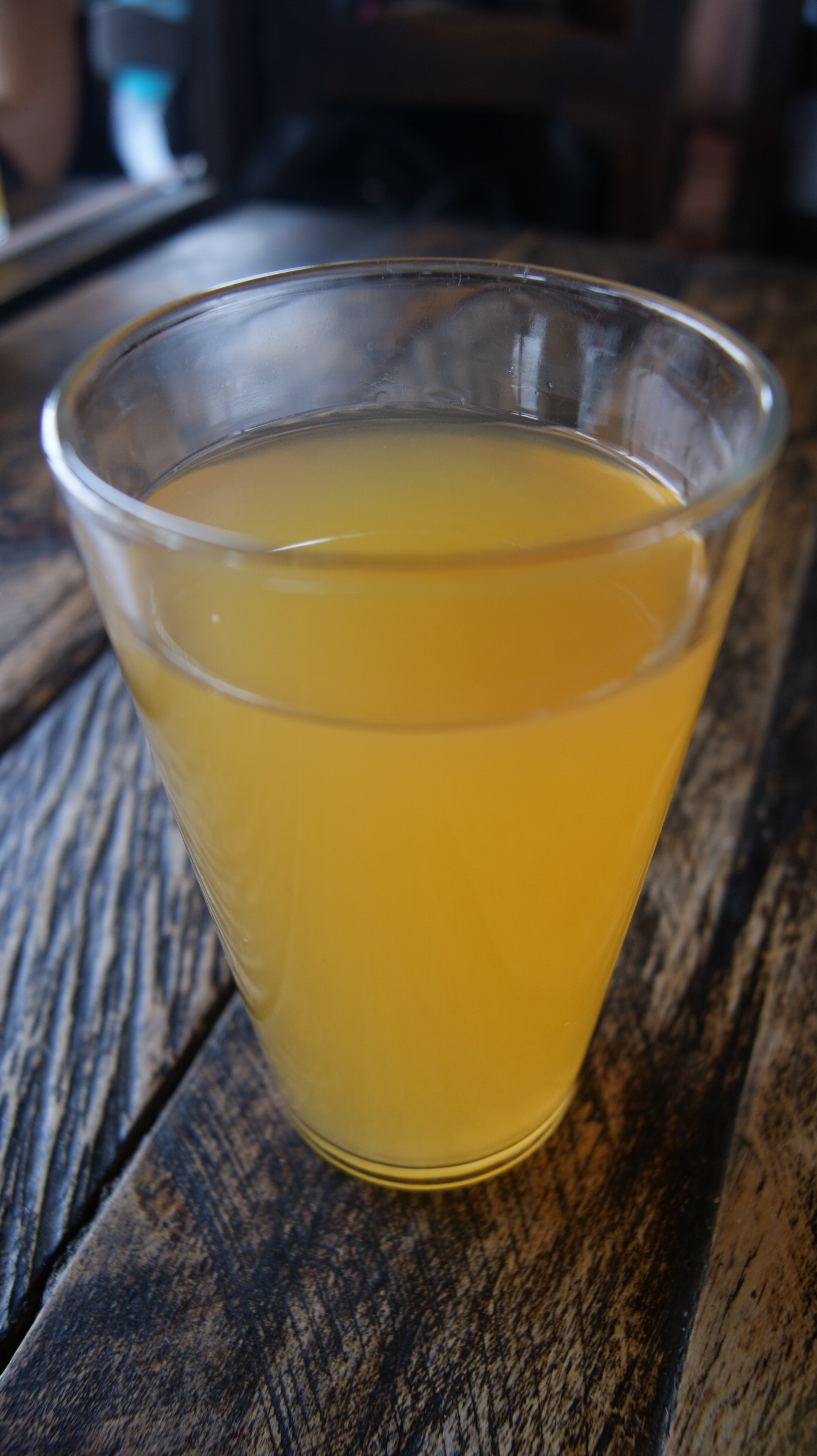 Guarapo, servido en el Peñón de Guatapé. Antioquia- Colombia.